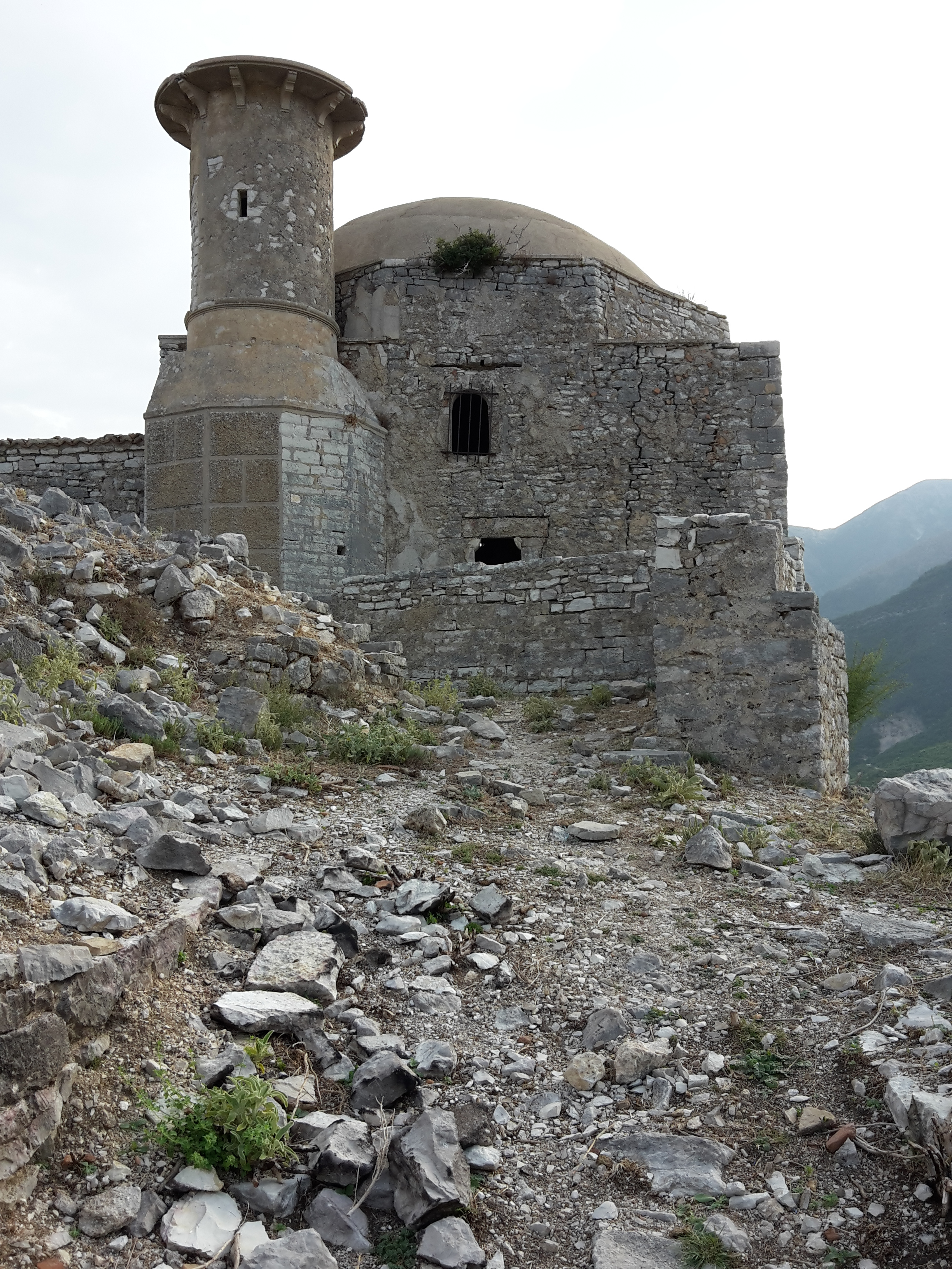 Kalaja E Borshit